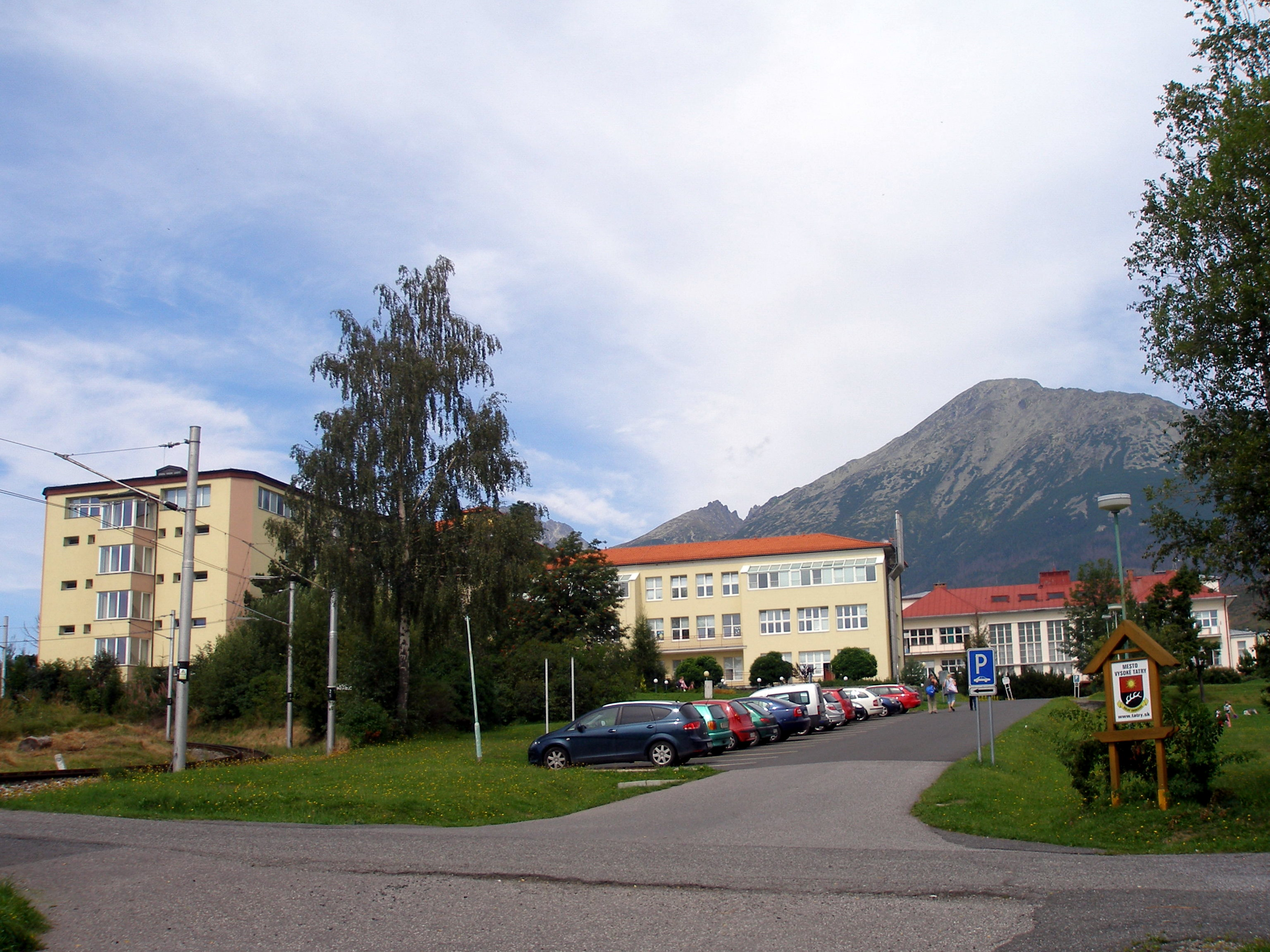 Tatranská osada Dolný Smokovec, mesto Vysoké Tatry, okres Poprad.